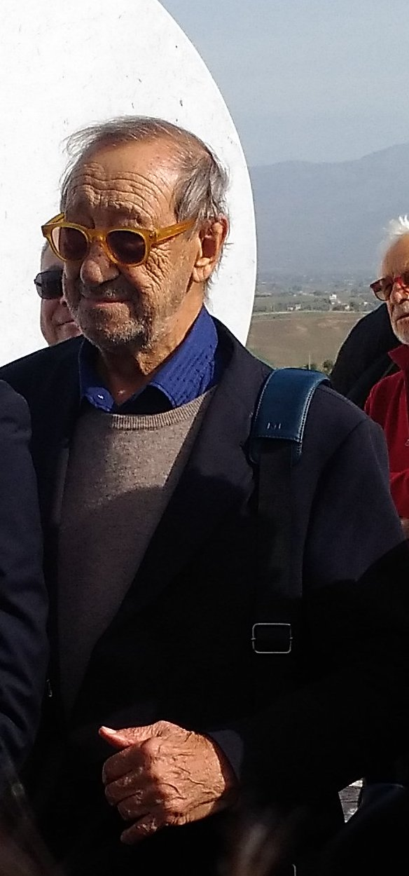 Turi Simeti, pittore alcamese